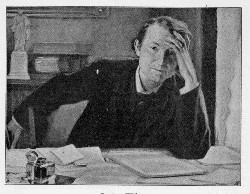 Tavla nu på Gbg:s nation i Ua